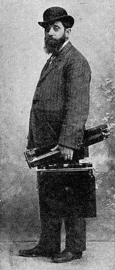 Xosé Gil Gil, fotografía en Vida Gallega 1909